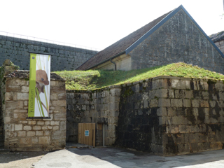 Extérieur du Noctarium